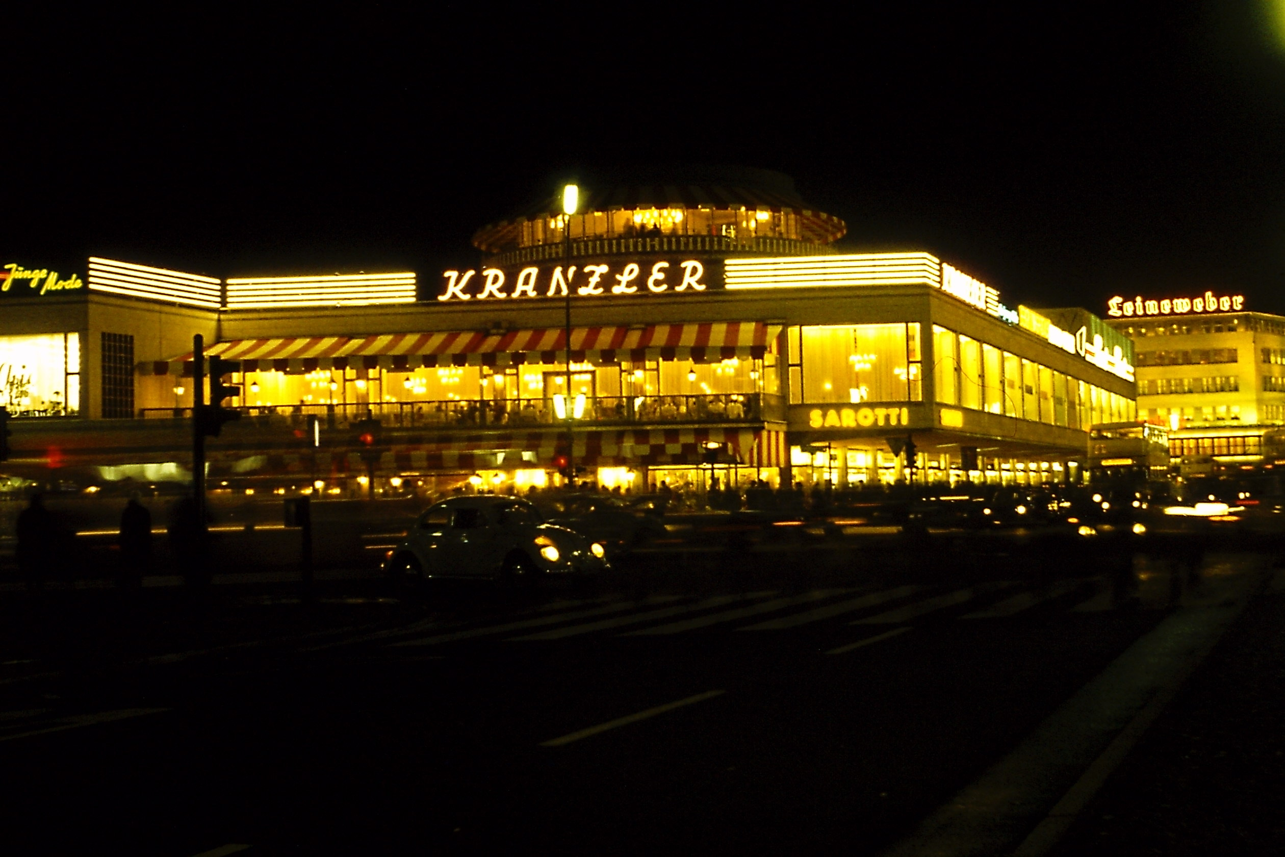 Deutschland (D) - Berlin (BE) - Kurfürstendamm: Café Kranzler